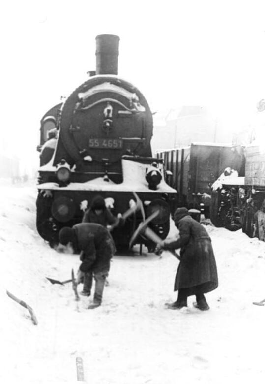 ADN-ZB/Donath II. Weltkrieg 1939 - 1945 Sowjetunion. In den von den faschistischen deutschen Truppen besetzten Gebieten. Orscha (Belorussische SSR): Sowjetische Bürger, die auf dem Bahnhof Zwangsarbeit leisten, legen mit der Spitzhacke die völlig vereisten Gleise frei. Aufn. Februar 1942